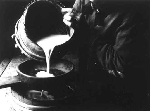 Siling av melk i Valle i Setesdal fotografert av Anna Grostøl i 1940. Norsk Folkemuseum NF.13565-048.